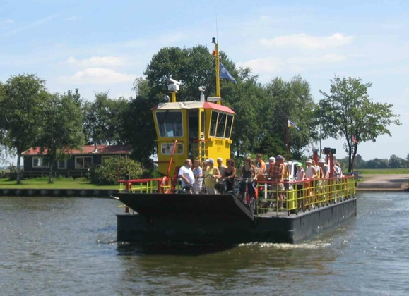 Veerpont de Burd, 2005